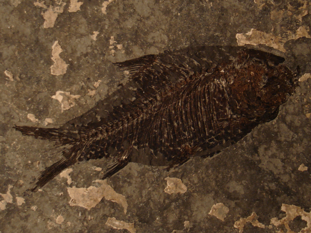 Fossil of Amyzon hunanensisCheng 1962 (jr syns= Jianghanichthys hubeiensis Lei 1987; Osteochilus hunanensis Cheng 1962; Osteochilus hubeiensis lei, 1977)